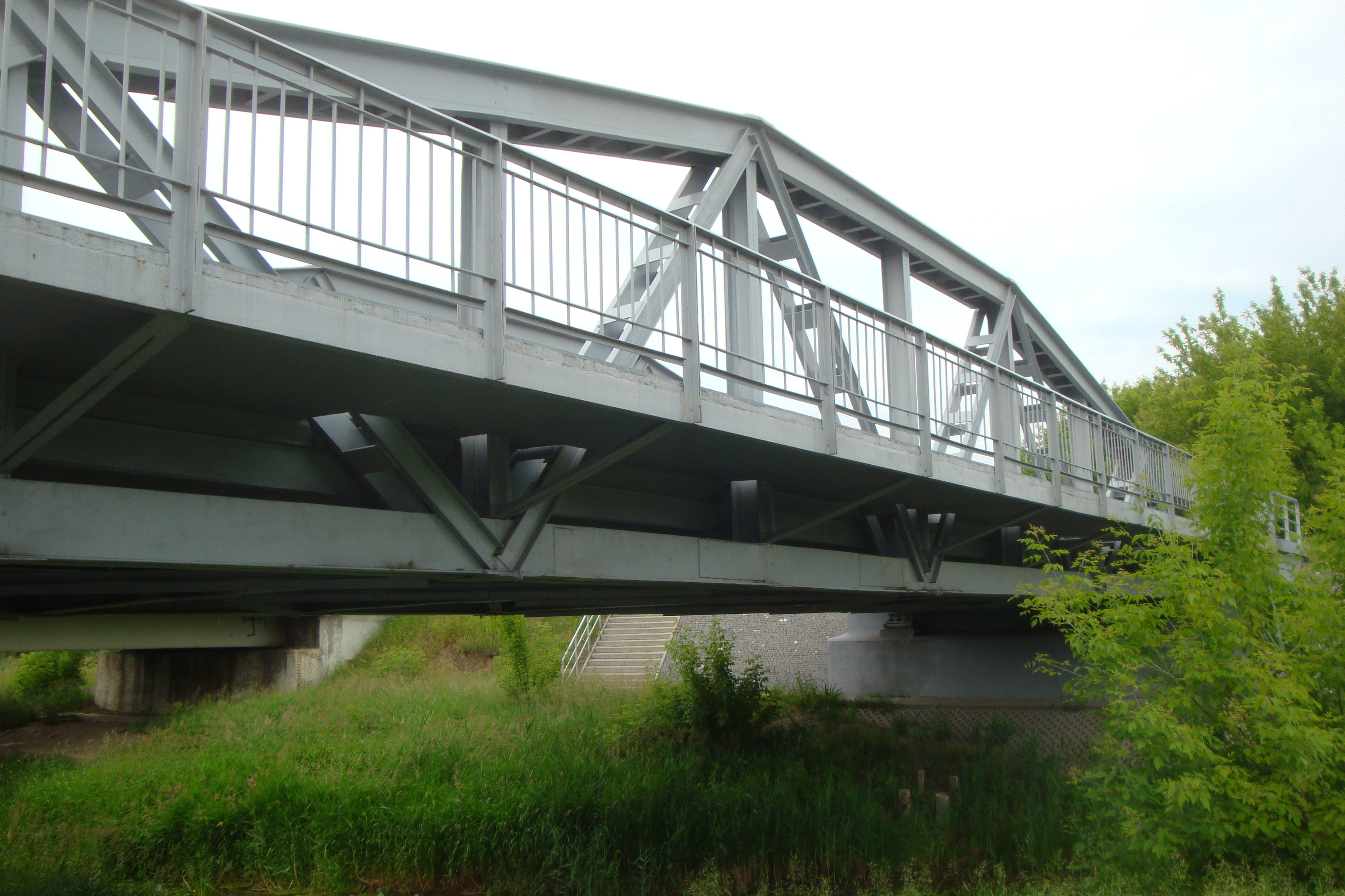 most spawany na rzece Słudwii, 1929 Maurzyce, gmina Zduny